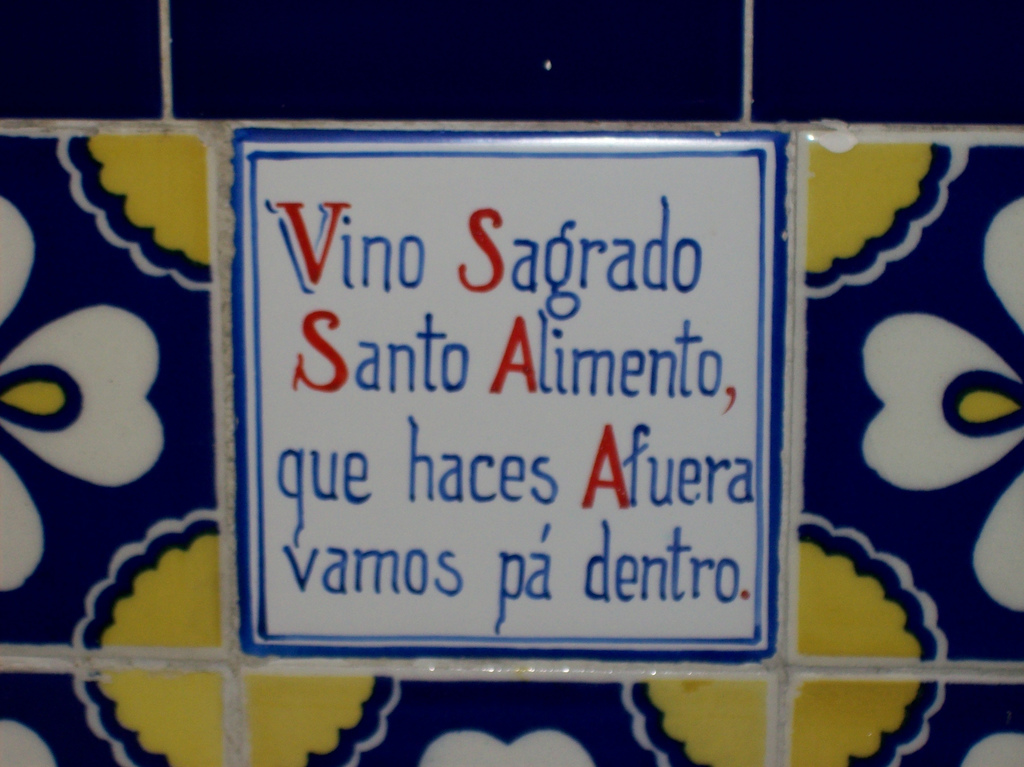 Seigneur que ta volonté soit faite : « Vin sacré, nourriture sainte, que vous faire à l'extérieur, on se les met dedans ». « Vino sagrado, santo alimento, que haces afuera vamos pà dentro »